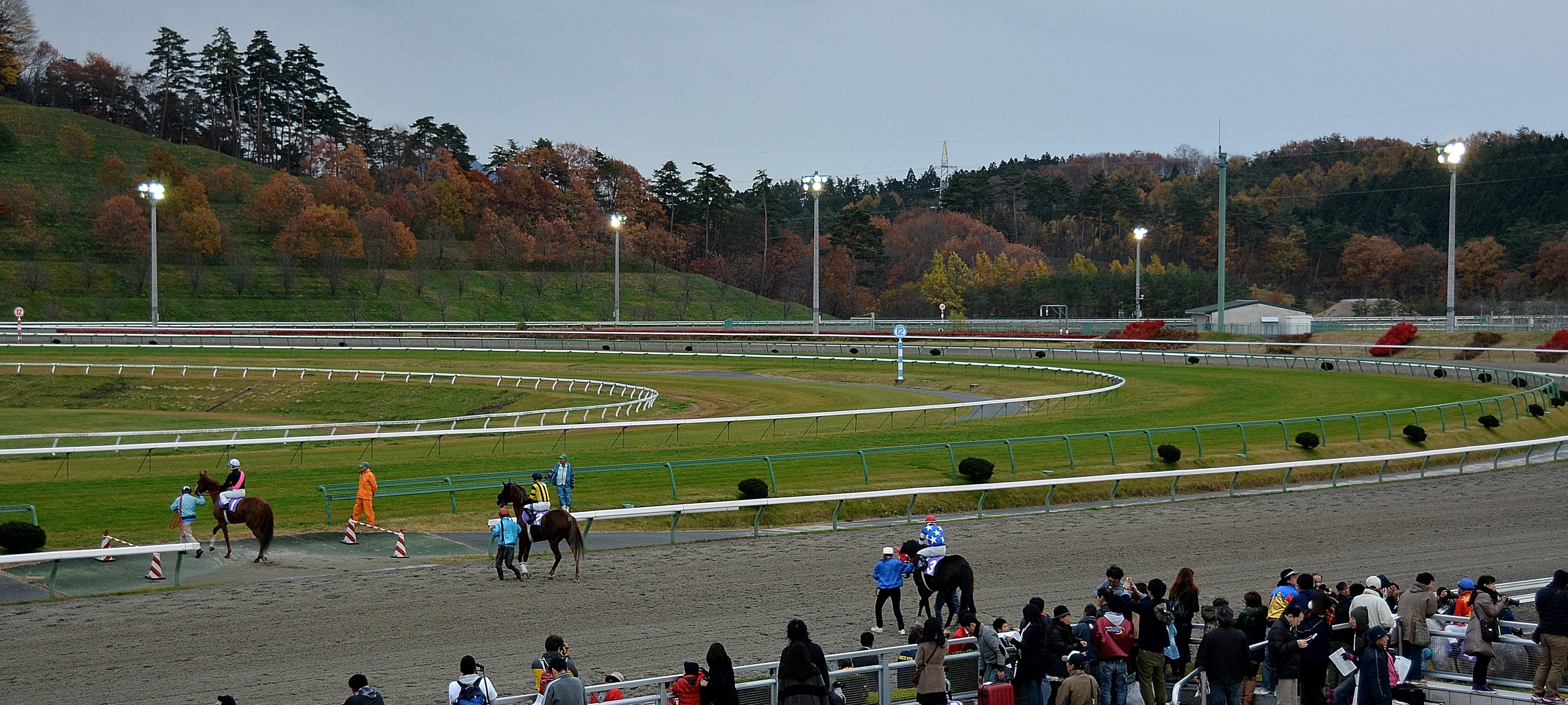 盛岡競馬場の芝コースへ競走馬が入場する動線を、観客席から撮影したもの。撮影タイミングは2014年11月3日の第11競走「秋嶺賞」の返し馬。【動線の説明】写真右下のパドックからダートコースを経たのち、入口を開けている芝コースへ入場してゆき、返し馬を兼ねてスターティングゲートへ向かう。